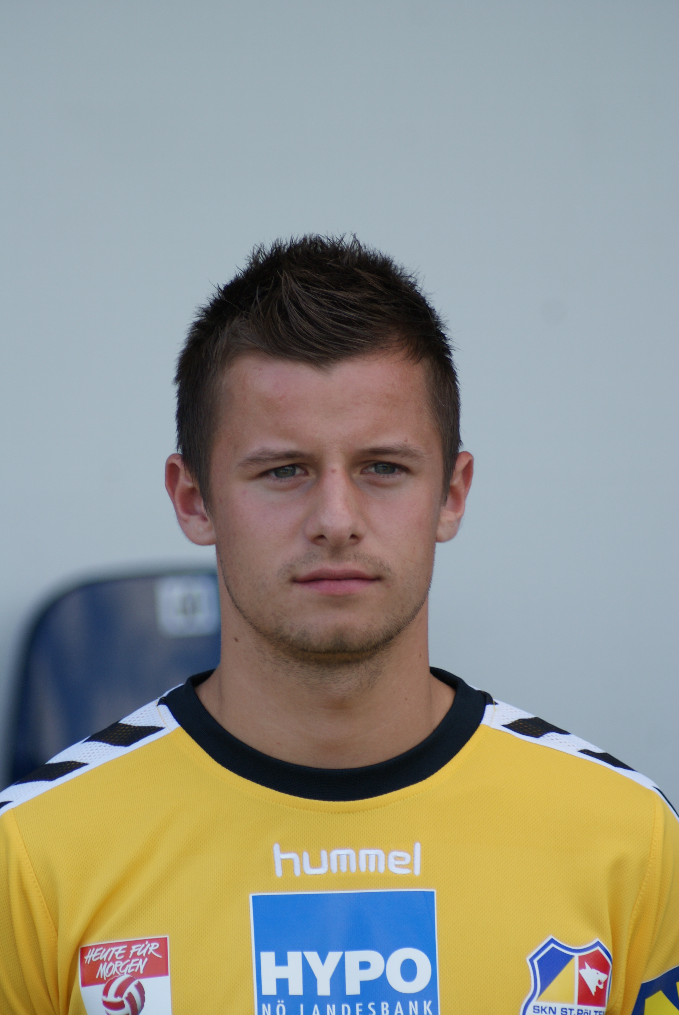 Peter Brandl, SKNV St. Pölten.